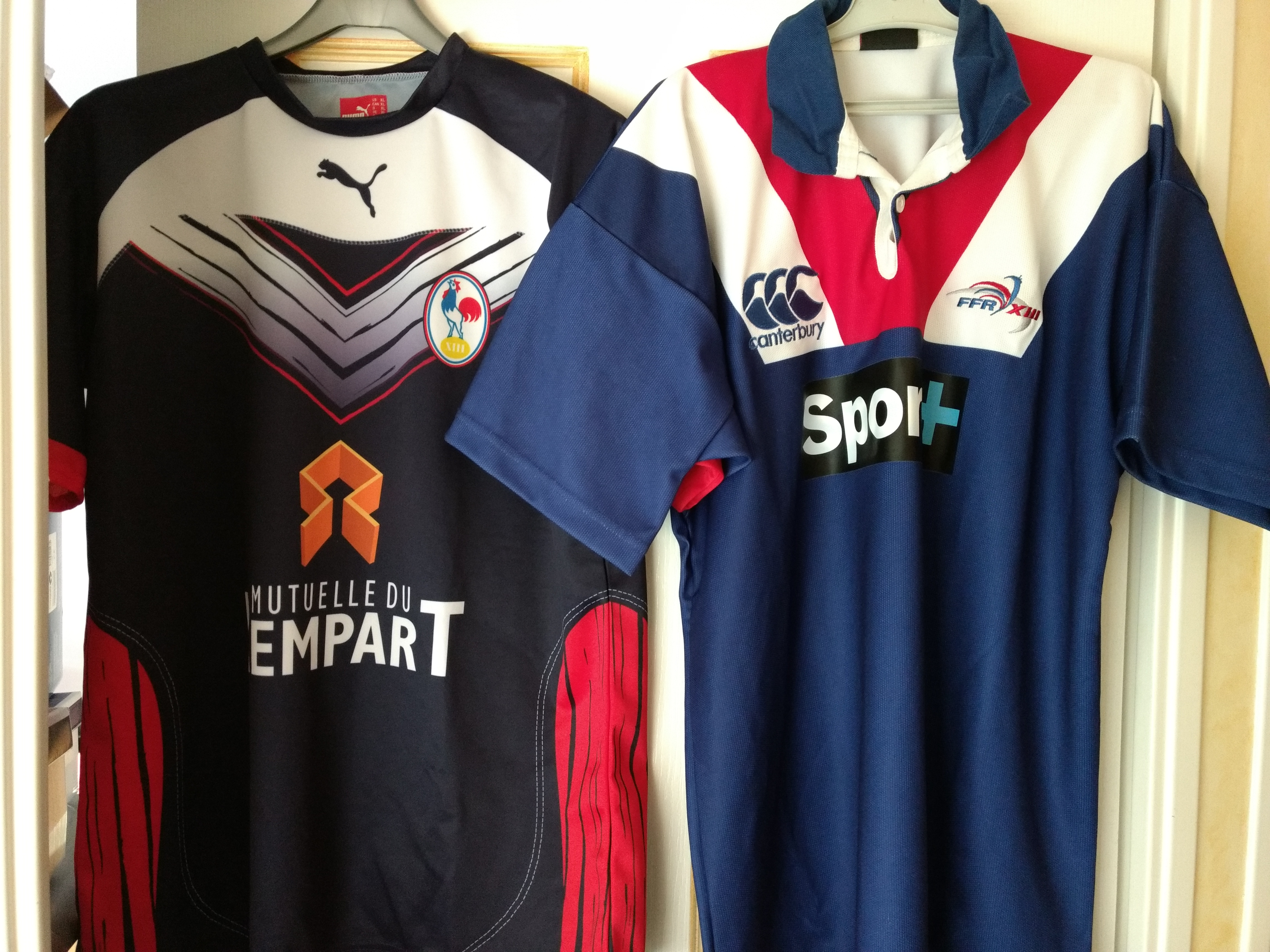 Photo de deux Maillots du XIII de France des années 2000